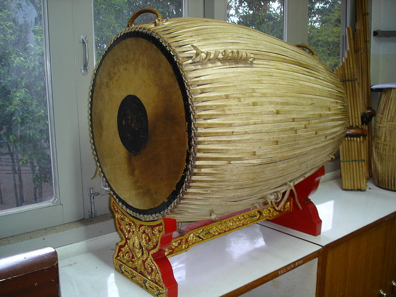 ตะโพนมอญ